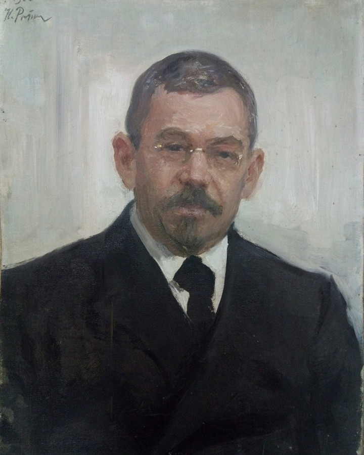 Портрет Дмитра Багалія за авторством Іллі Рєпіна